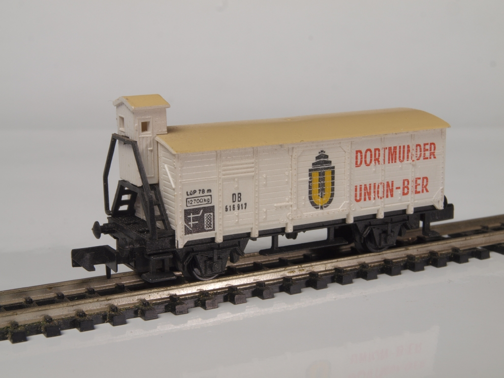 Gedeckter Güterwagen G10 mit Bremserhäuschen der DB als Arnold Rapido N-Spur Modell mit Aufdruck Dortmunder Union Bier. Arnold Artnr. 7271